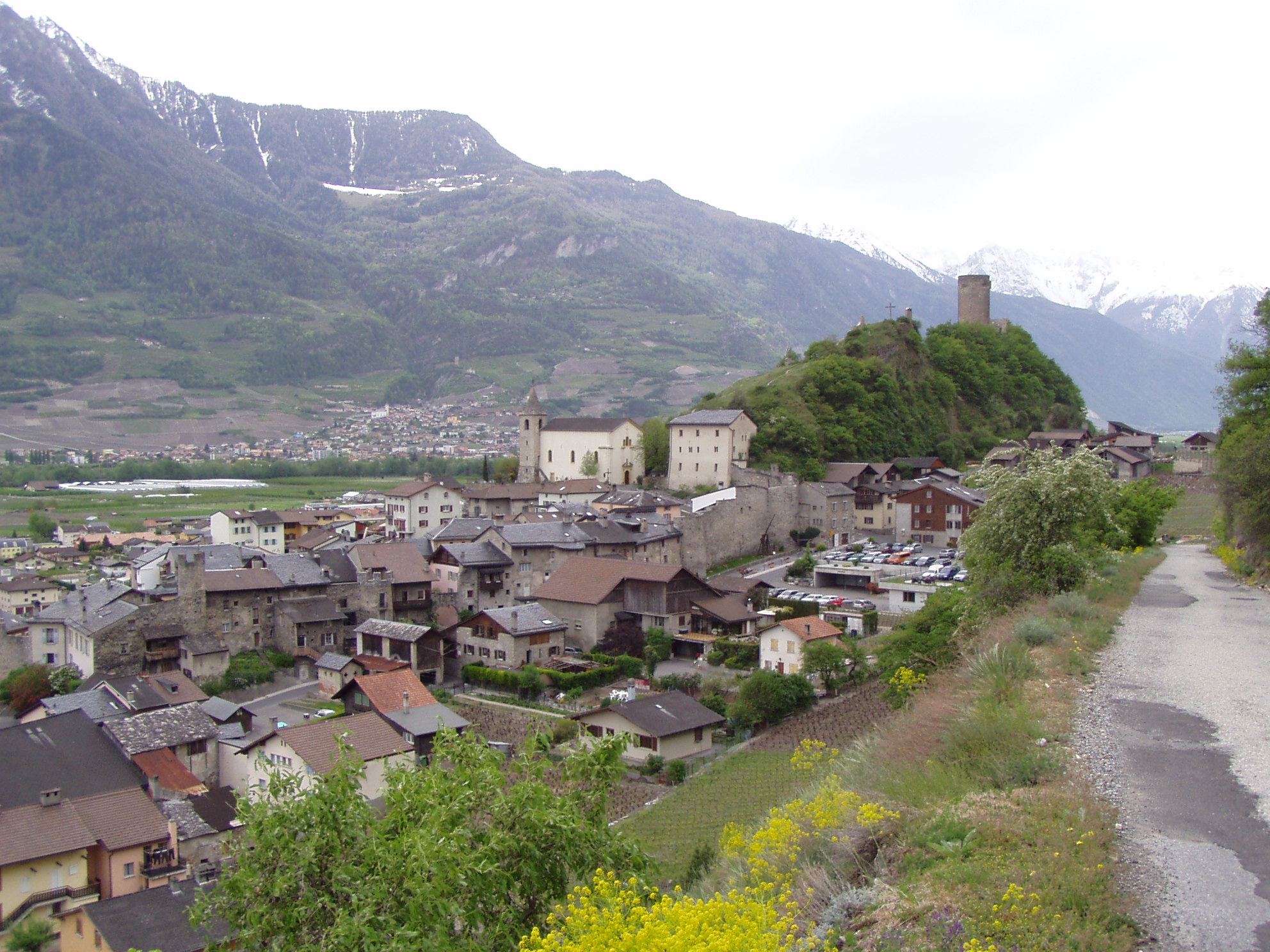 Saillon